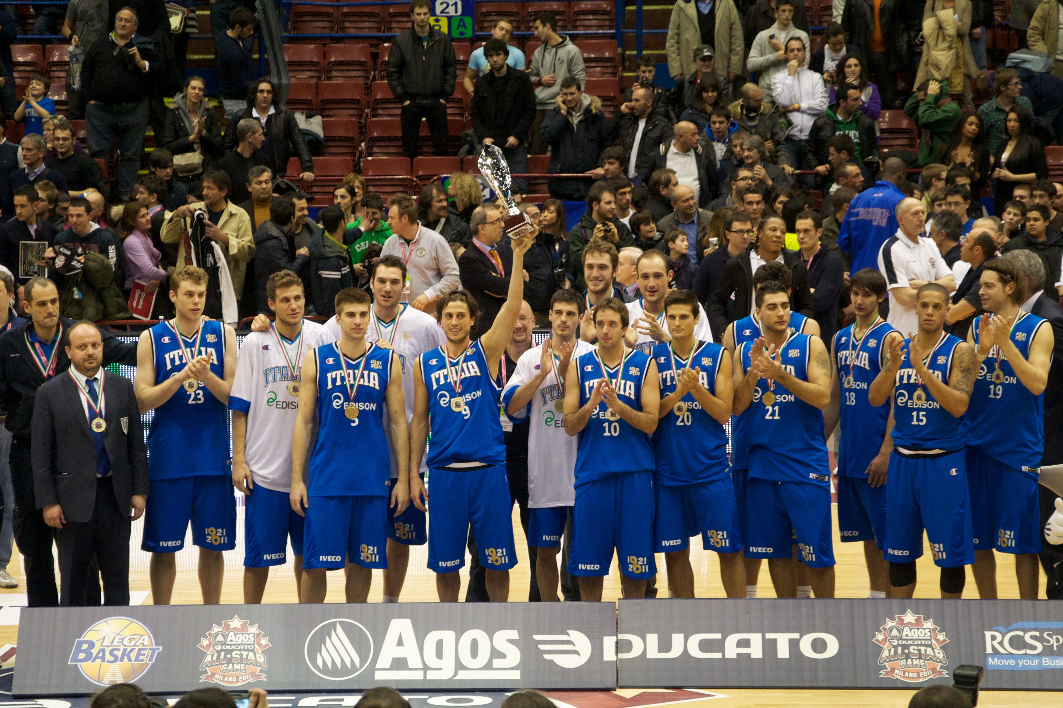 Italia basket team